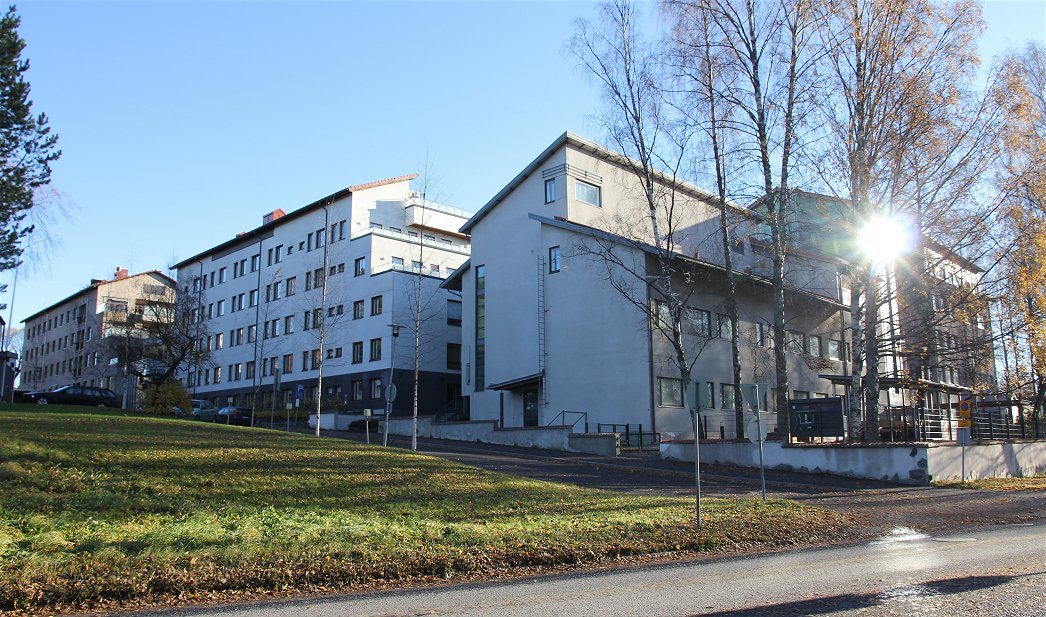 Kuopion yliopistosairaalan lapsi- ja nuorisopotilaisiin erikoistunut Alavan sairaala toimii Kuopion Haapaniemen kaupunginosassa, Alavan kirkon ja Kuopion keskuskentän välisessä rinteessä.